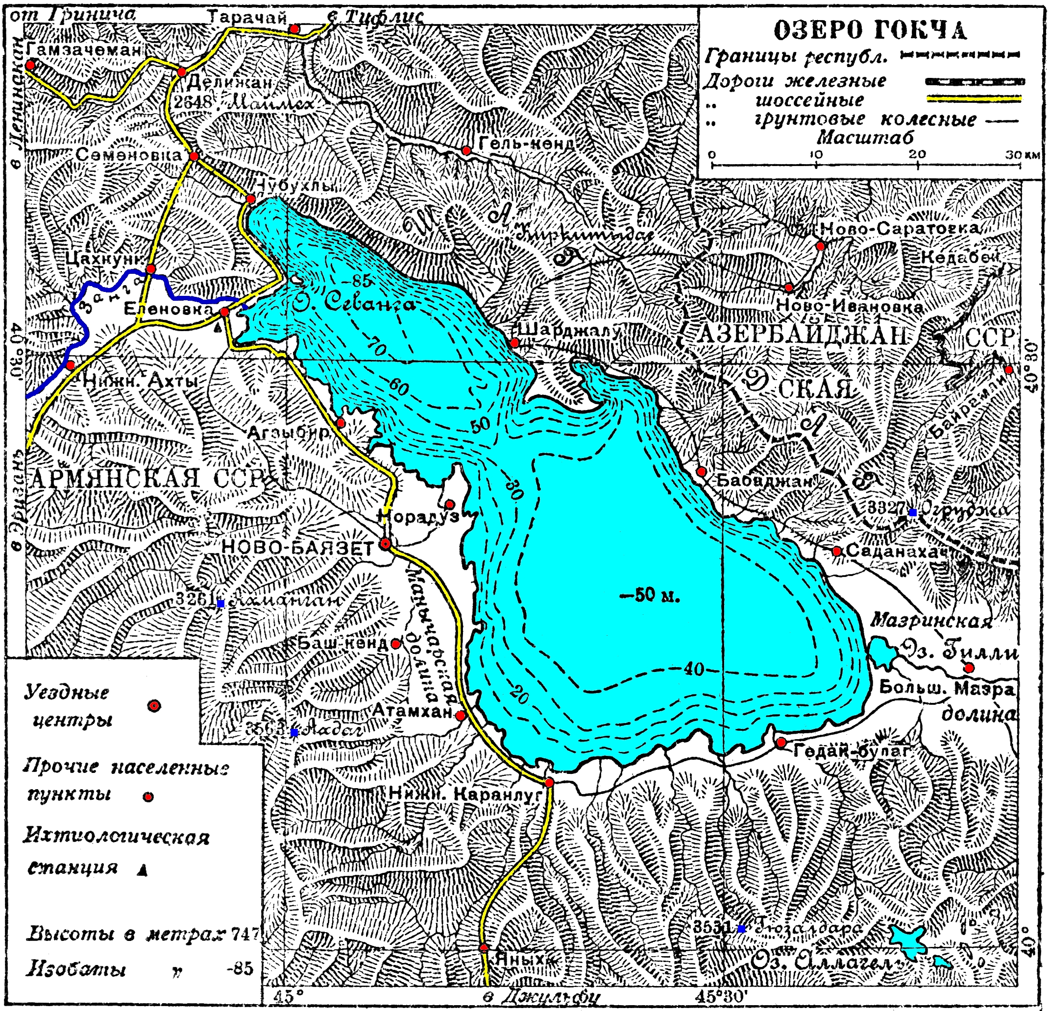 Карта озера Гокча / Севан, 1930 года Большая советская энциклопедия, 1 издание, 1930 год Добавлены фоновые цвета.